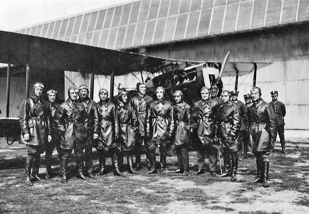 Piloci 3 pułku lotniczego Poznań-Ławica 1927 r. Kapitan pilot Józef Mickiewicz trzeci z lewej.